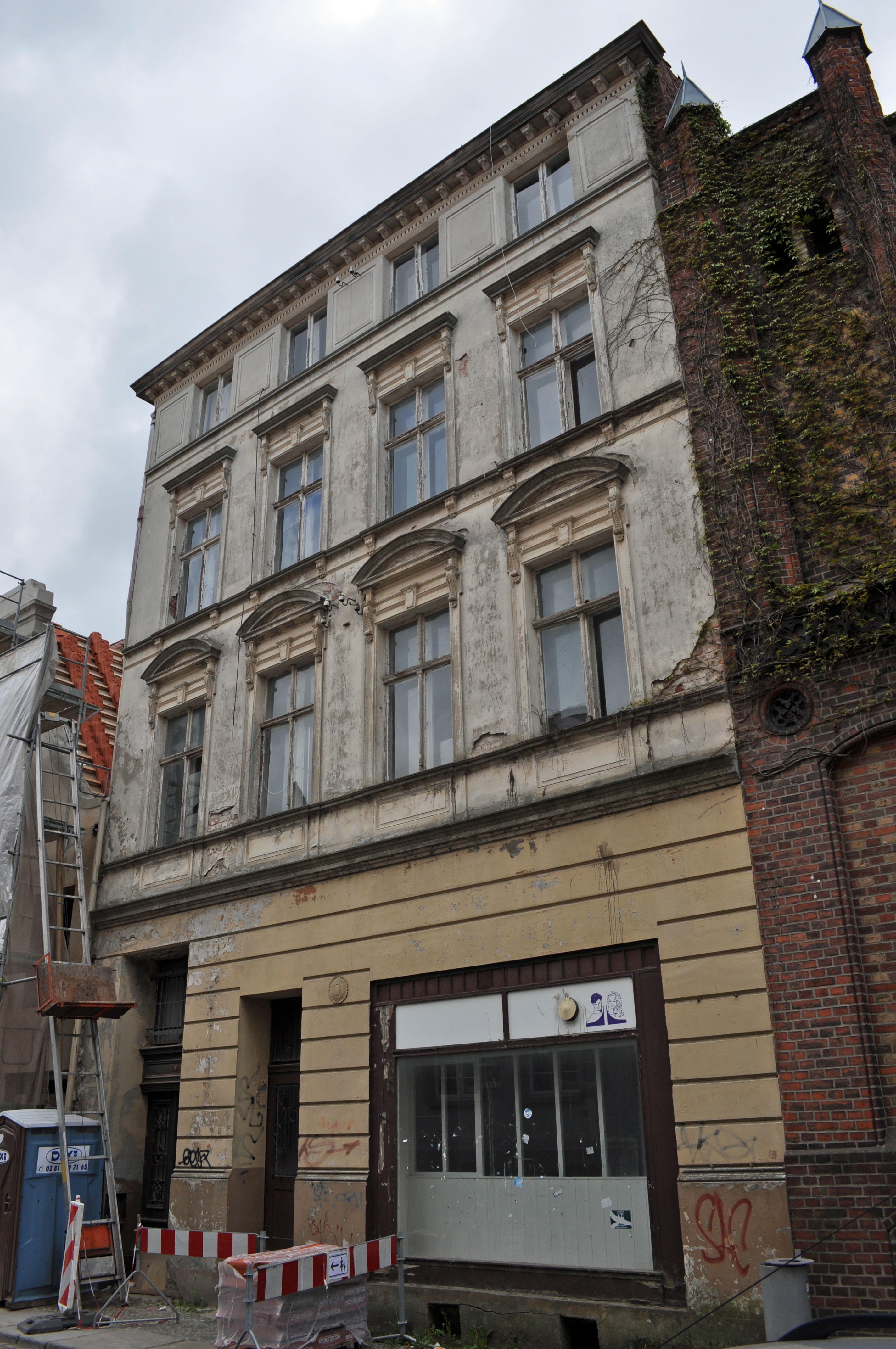 Gebäude in Stralsund, siehe Dateiname